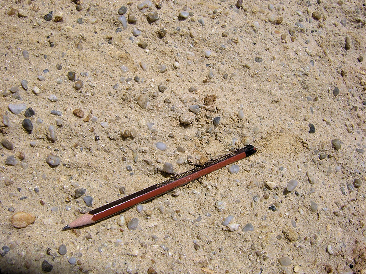 „Graupensand“ mit einem Bleistift als Maßstab